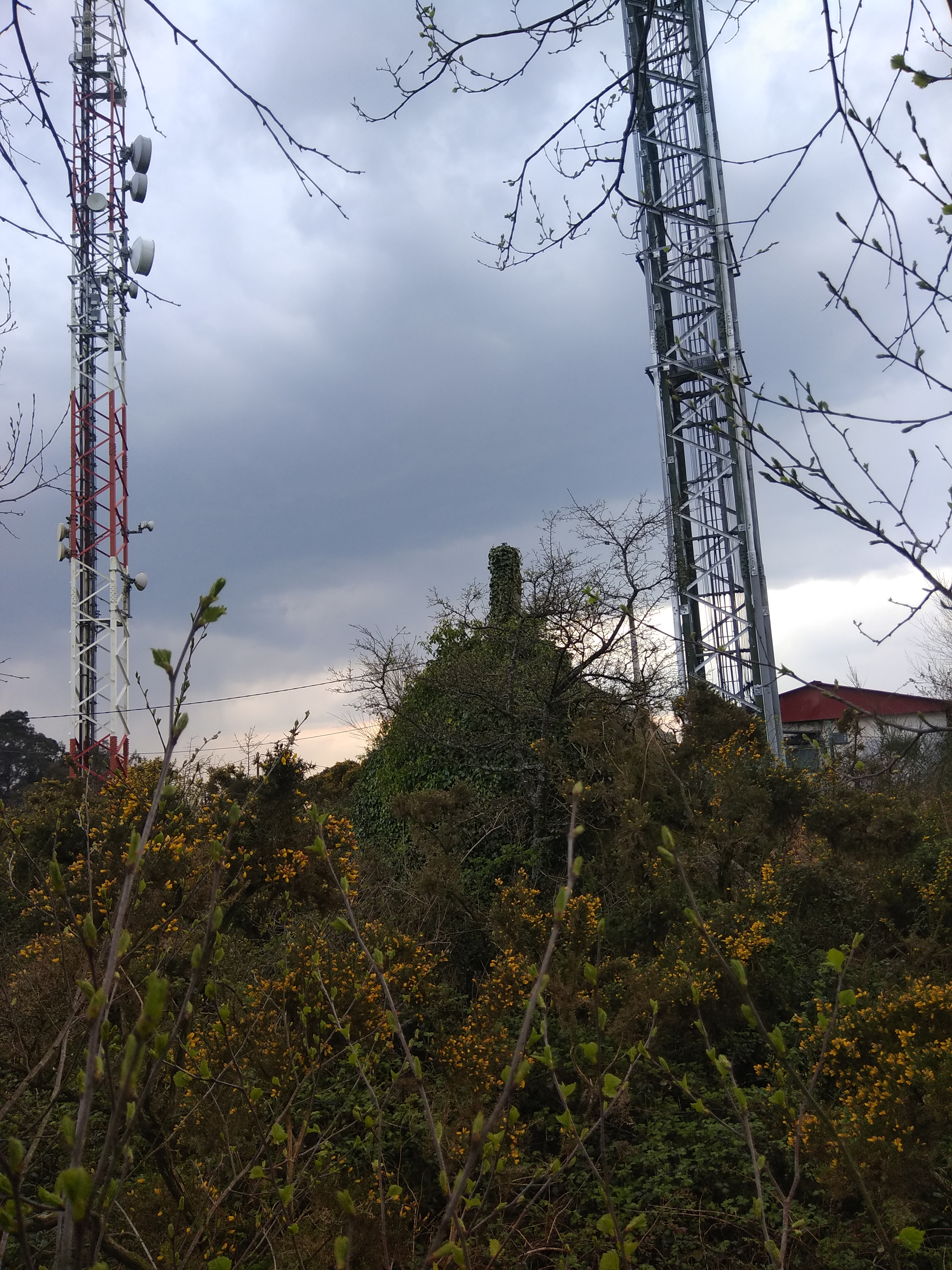 Vértice xeodésico do Enxameado, Curtis, Galiza.